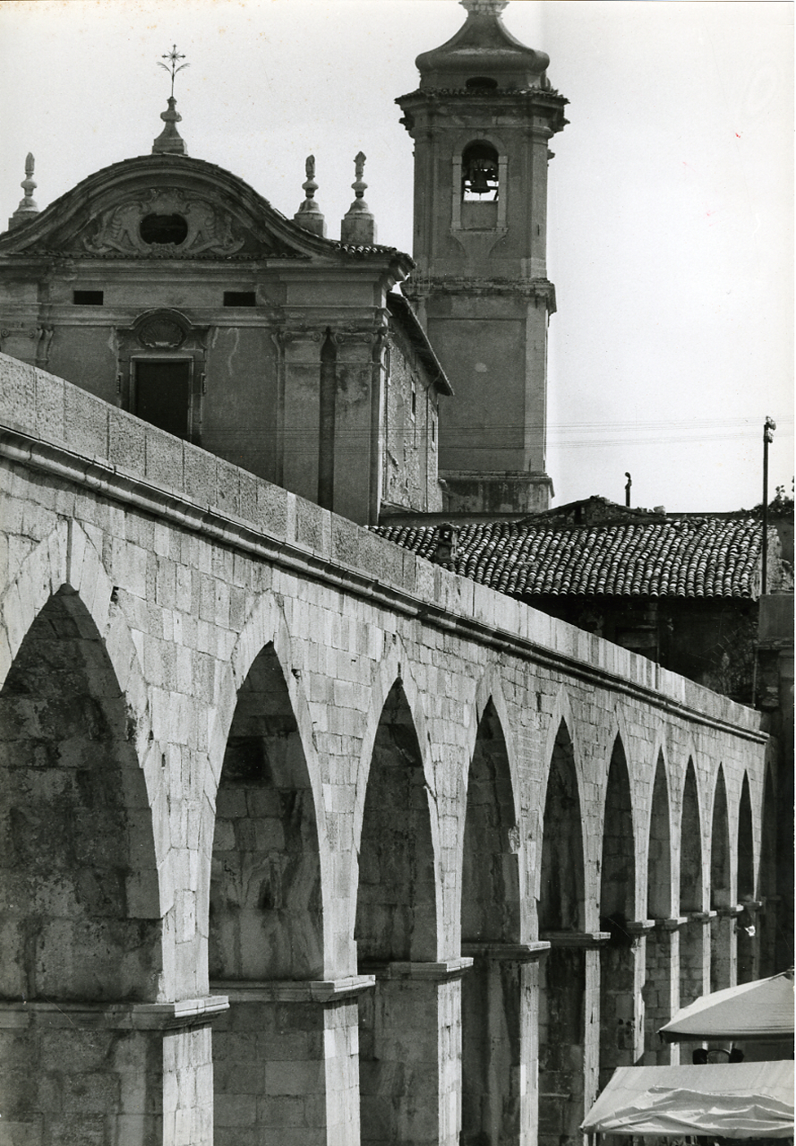 Sulmona, l'acquedotto medievale. Servizio fotografico : Italia, 1975 / Paolo Monti. - Stampe: 4 : Positivo b/n, gelatina bromuro d'argento/ carta, 30x40. - ((Al verso delle stampe iscrizioni didascaliche manoscritte a matita; timbro a inchiostro con copyright (Corso Sempione - Milano). - Sul coperchio della scatola iscrizione didascalica manoscritta a pennarello nero: "Architettura - Centri storici".